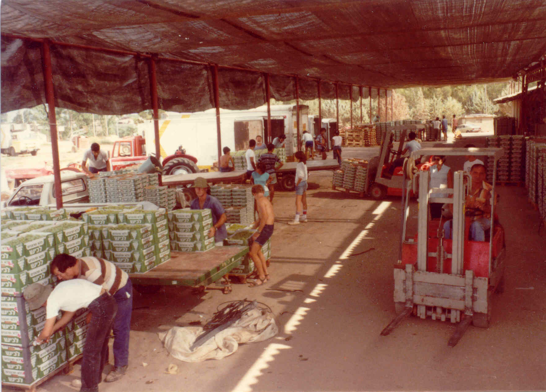 חקלאי מושב לכיש וילדיהם ביום בציר שגרתי - מעבירים את התוצרת למשאיות לשיווק